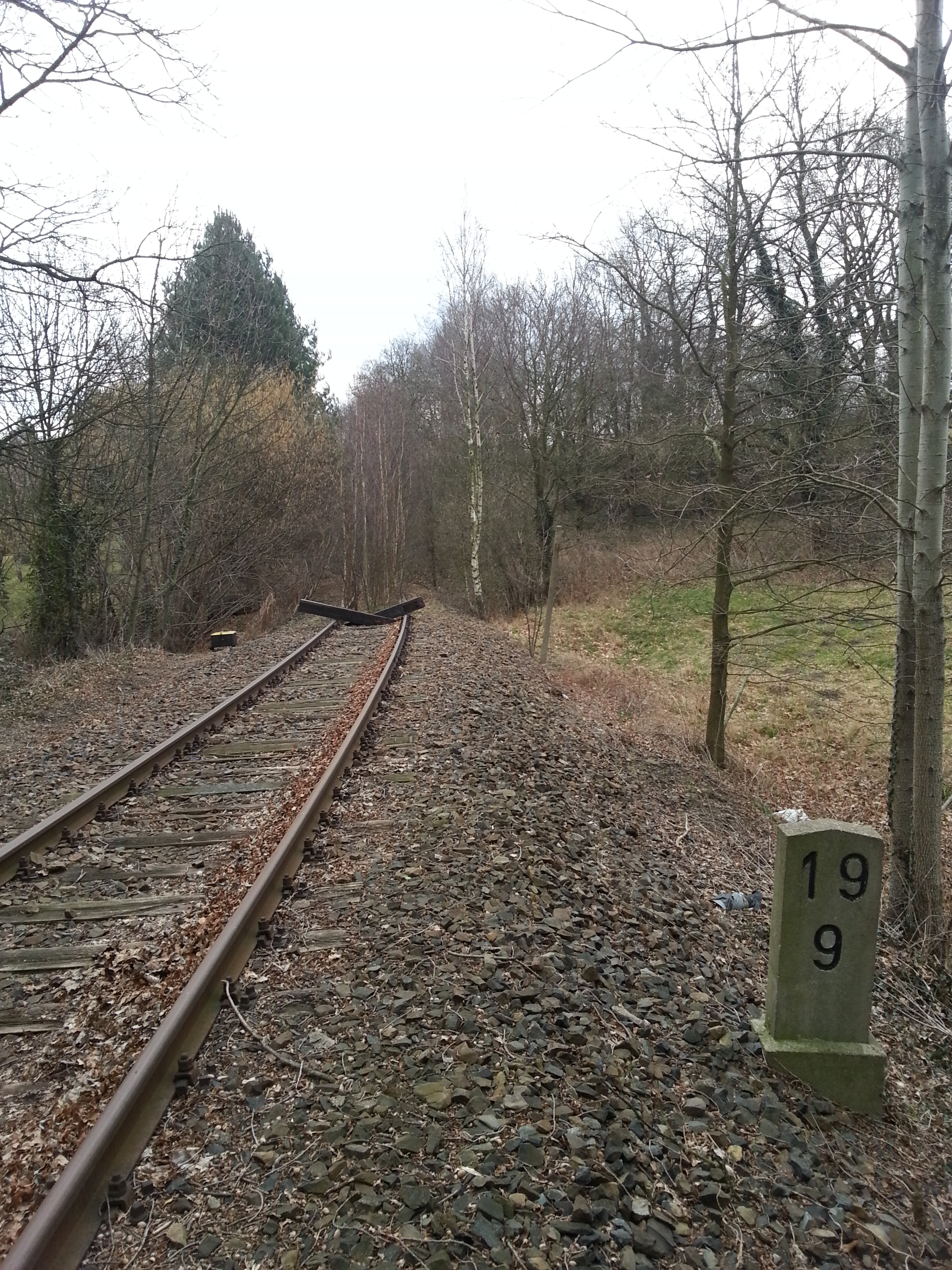 Ende des befahrbaren Abschnitts der Bahnstrecke Dresden-Klotzsche–Straßgräbchen-Bernsdorf in Königsbrück.